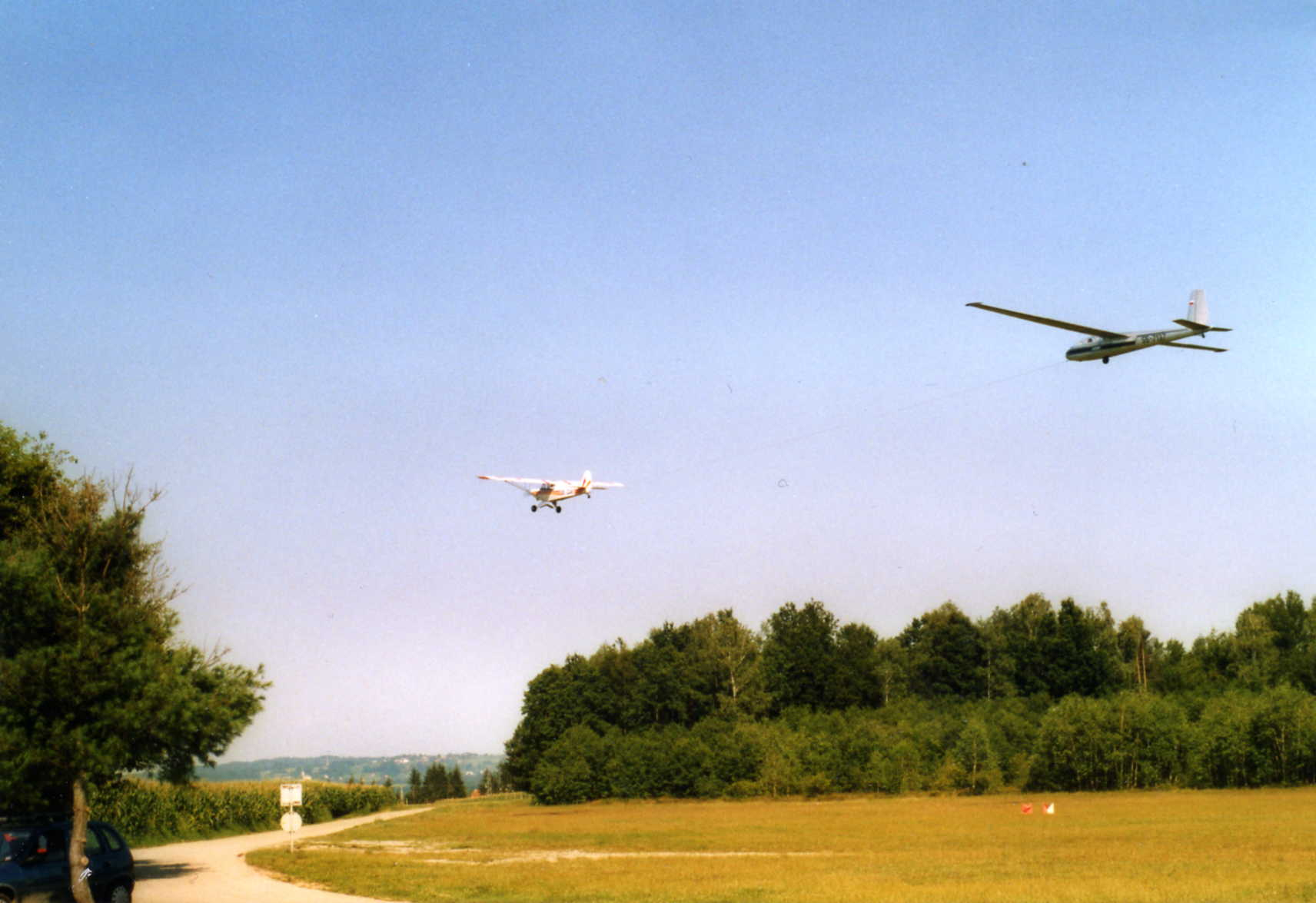 Airport Prilozje